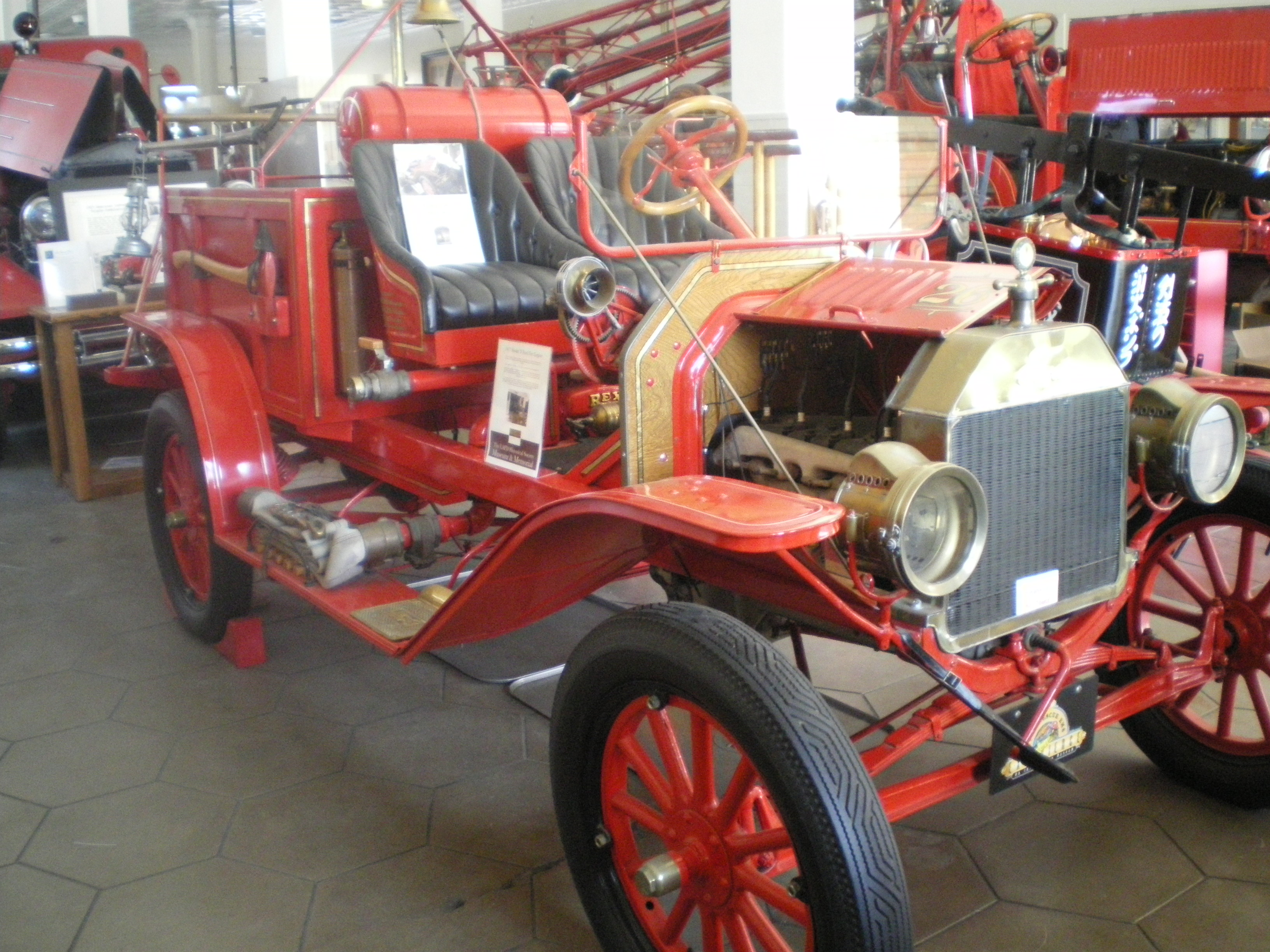 Model T Fire Engine, Los Angeles Firefighters Museum.